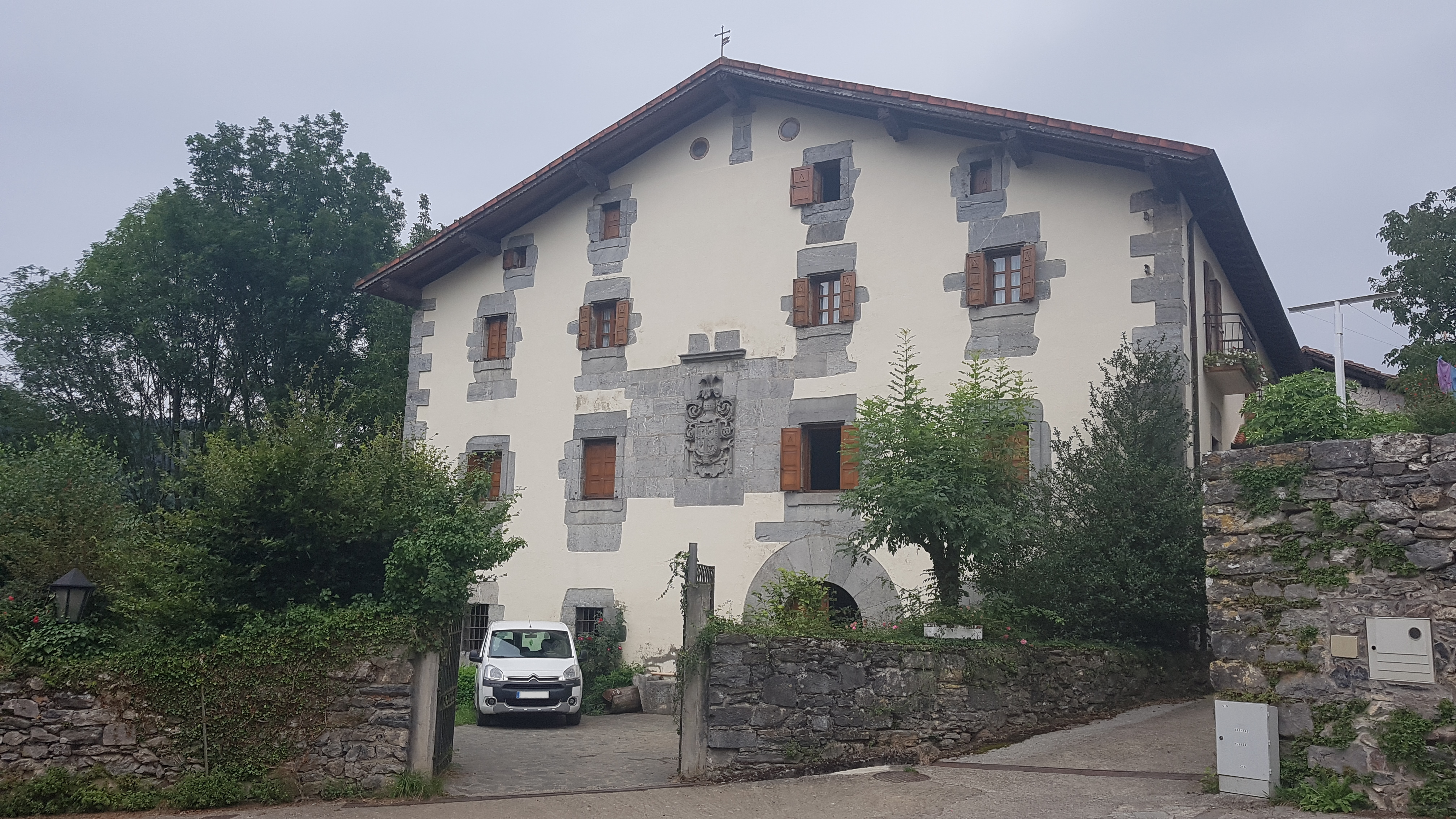 Lete baserria (Alkiza). Eraikitako euskal ondare nabaria izendatua.